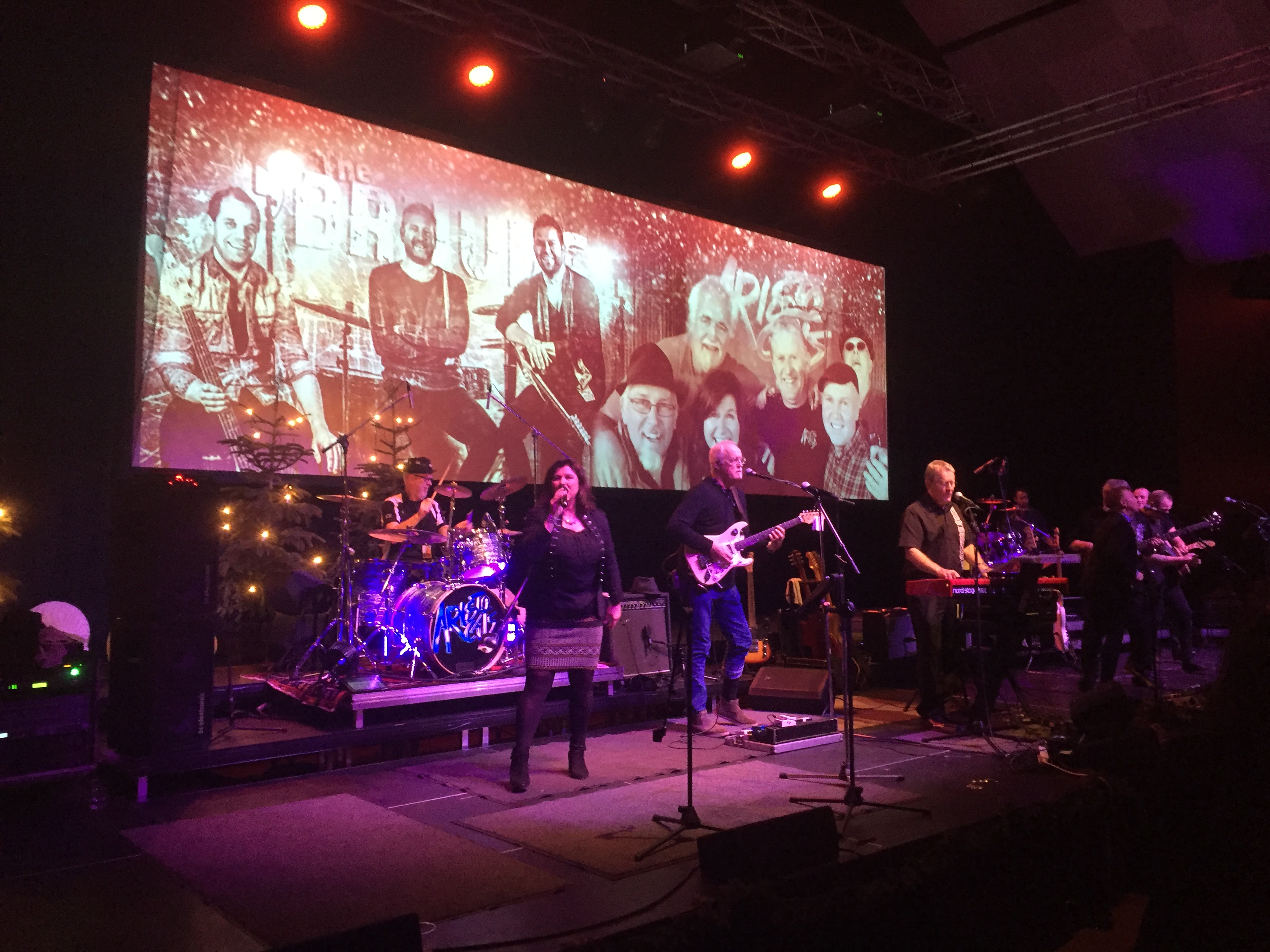 Aristocats og The Bruuds på Panorama Hotell og Resort